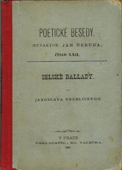 Selské balady, básnická sbírka Jaroslava Vrchlického